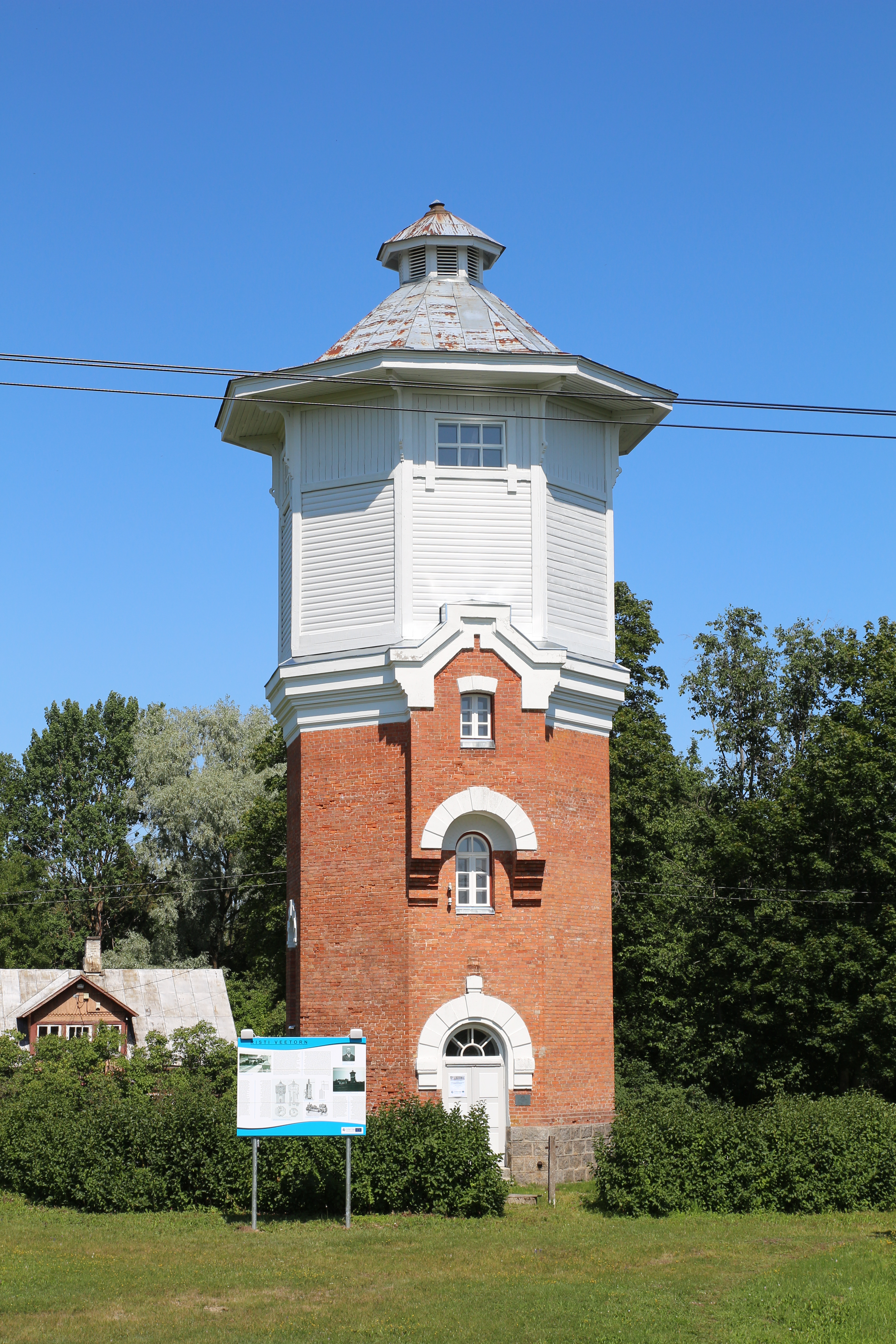 Risti veetorn 19.07.2017